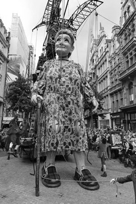 Royale de Luxe beim Auftritt in Antwerpen 2015. Jedesmal mit einem anderen Thema. Kommen rund alle vier Jahre nach Antwerpen. Werden dort sie "De Reuzen (Die Riesen)" genannt.